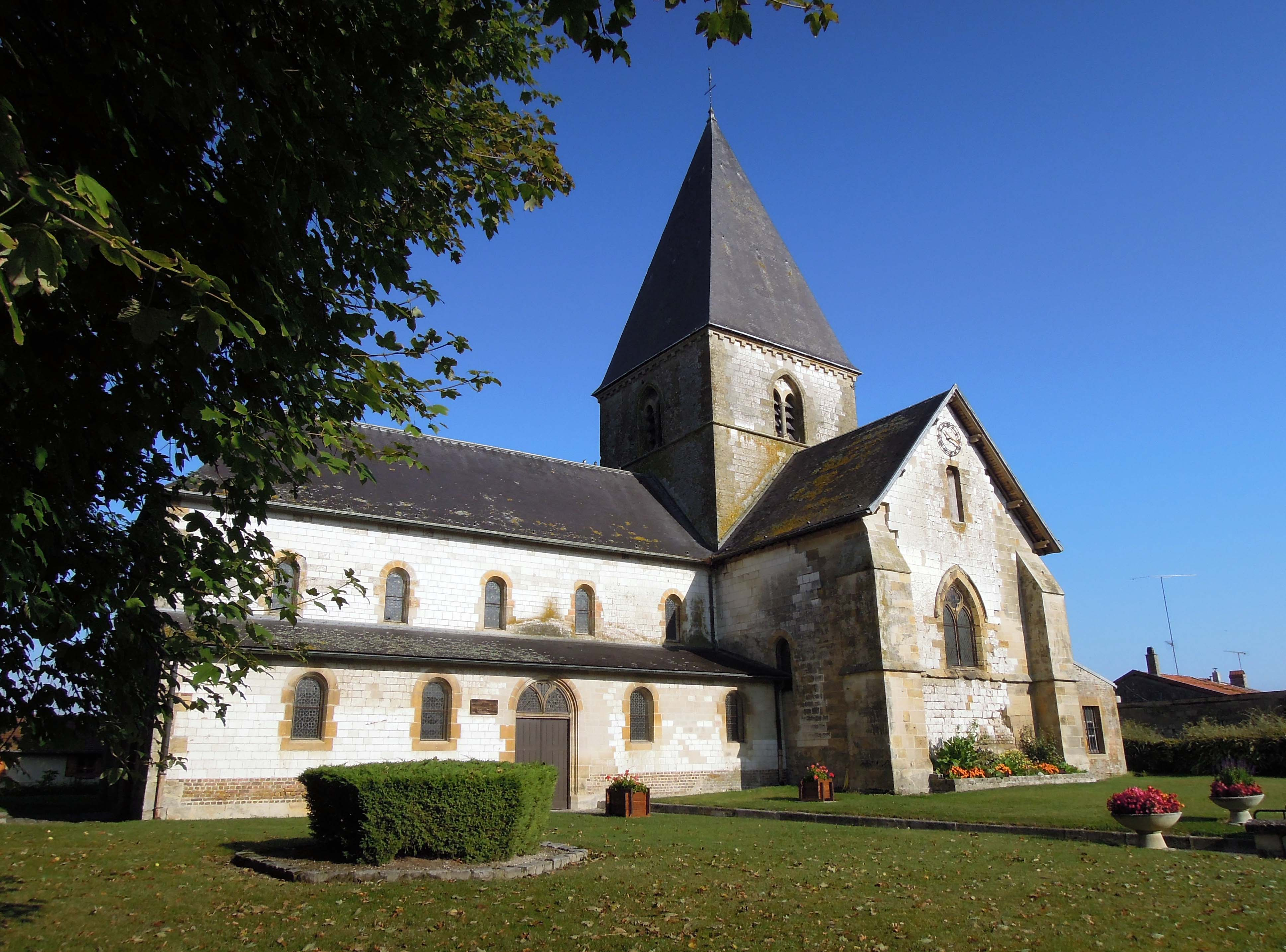 Église Saint-Pierre-et-Saint-Paul, (Classé, 1919) .